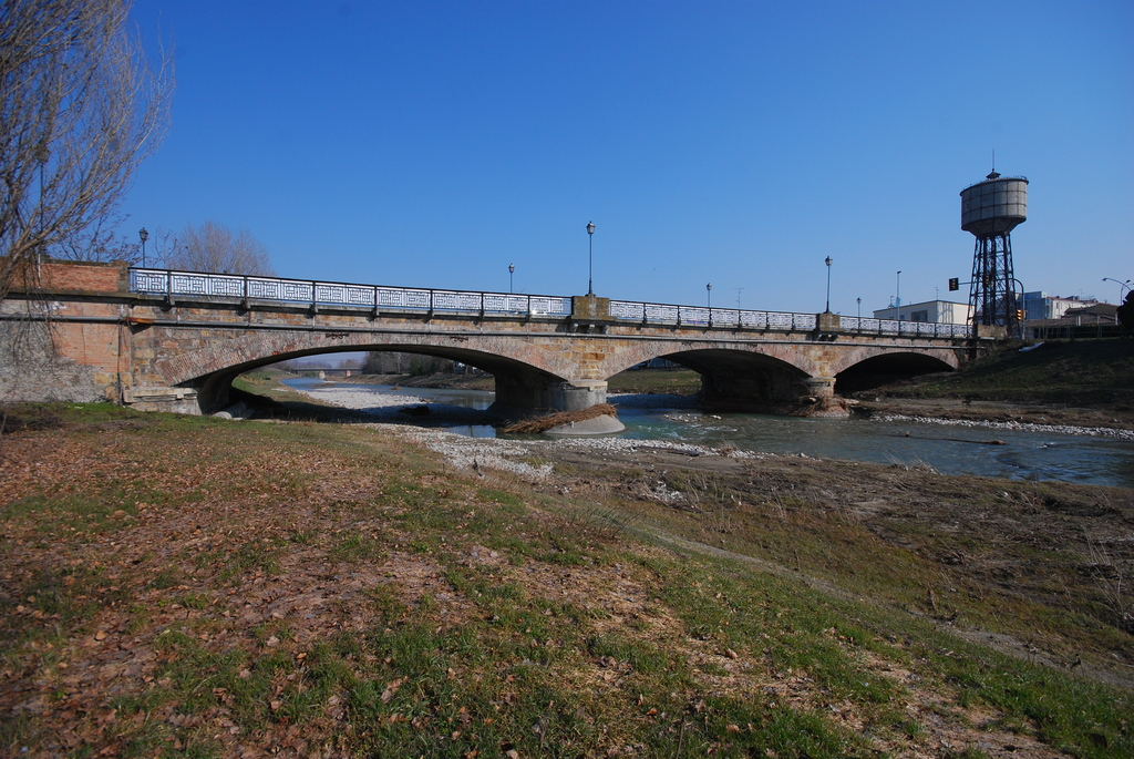 Ponte Ingresso Fiorenzuola